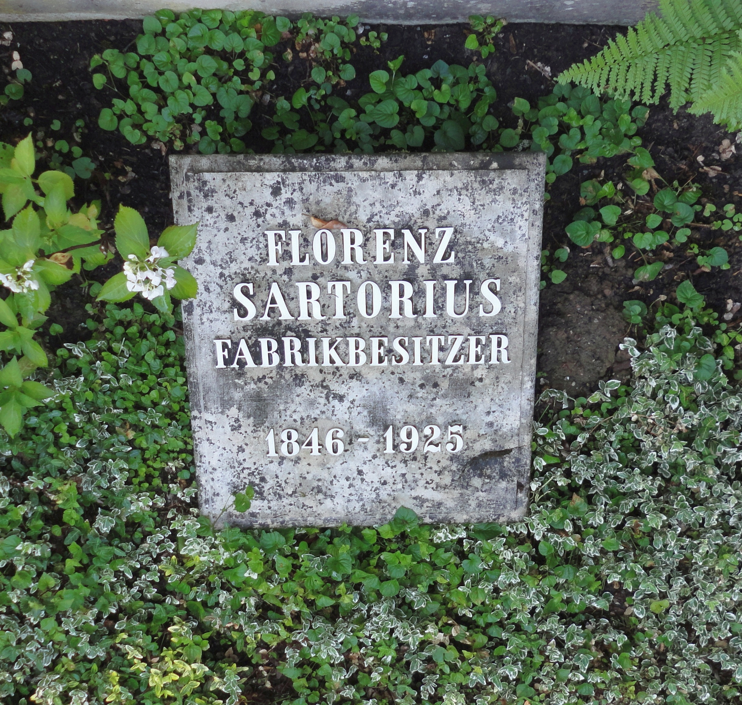 Göttingen, Stadtfriedhof: Familiengrabstätte Sartorius, Gedenktafel für Florenz Sartorius